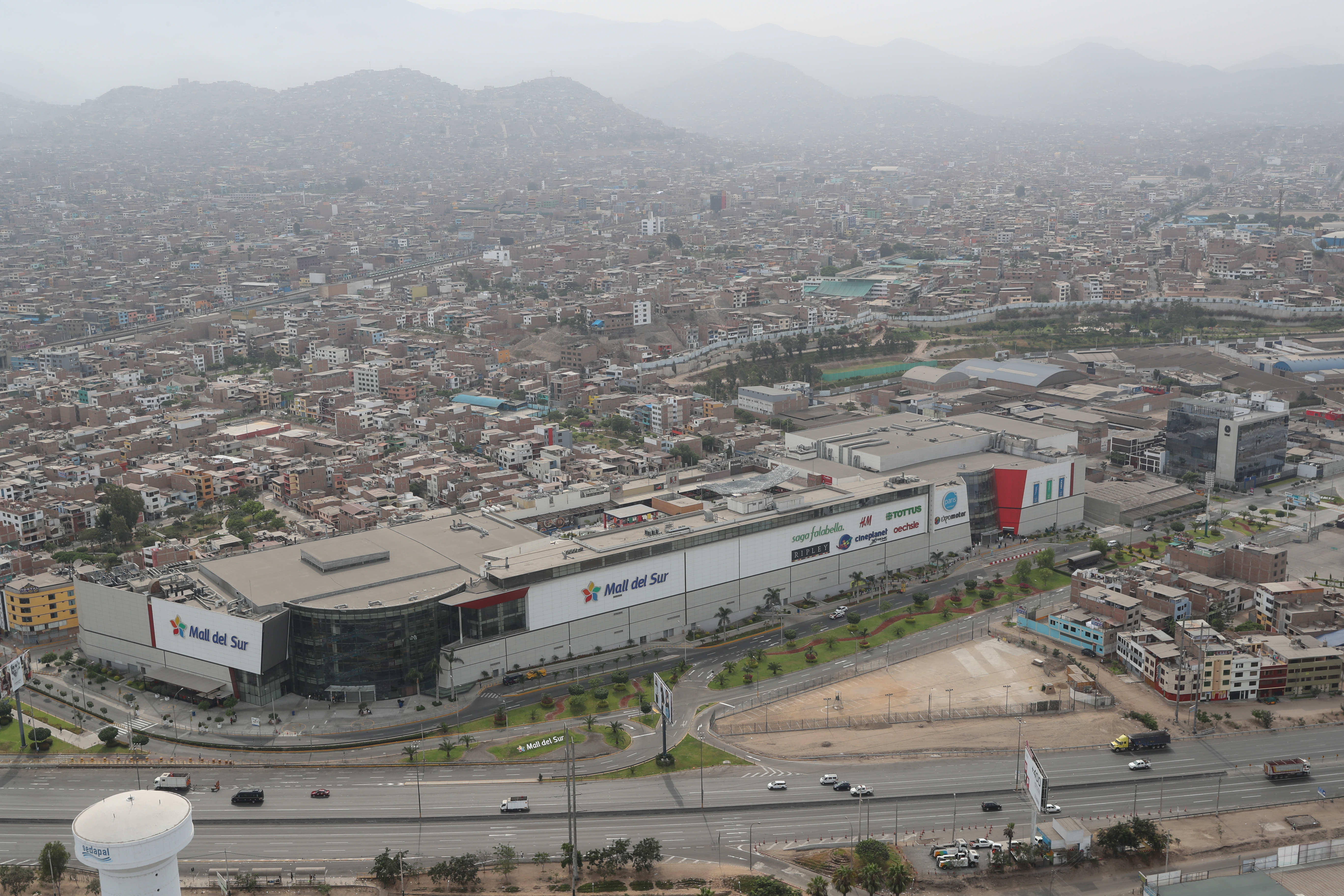 Mall del Sur durante la cuarentena 2020 en Perú